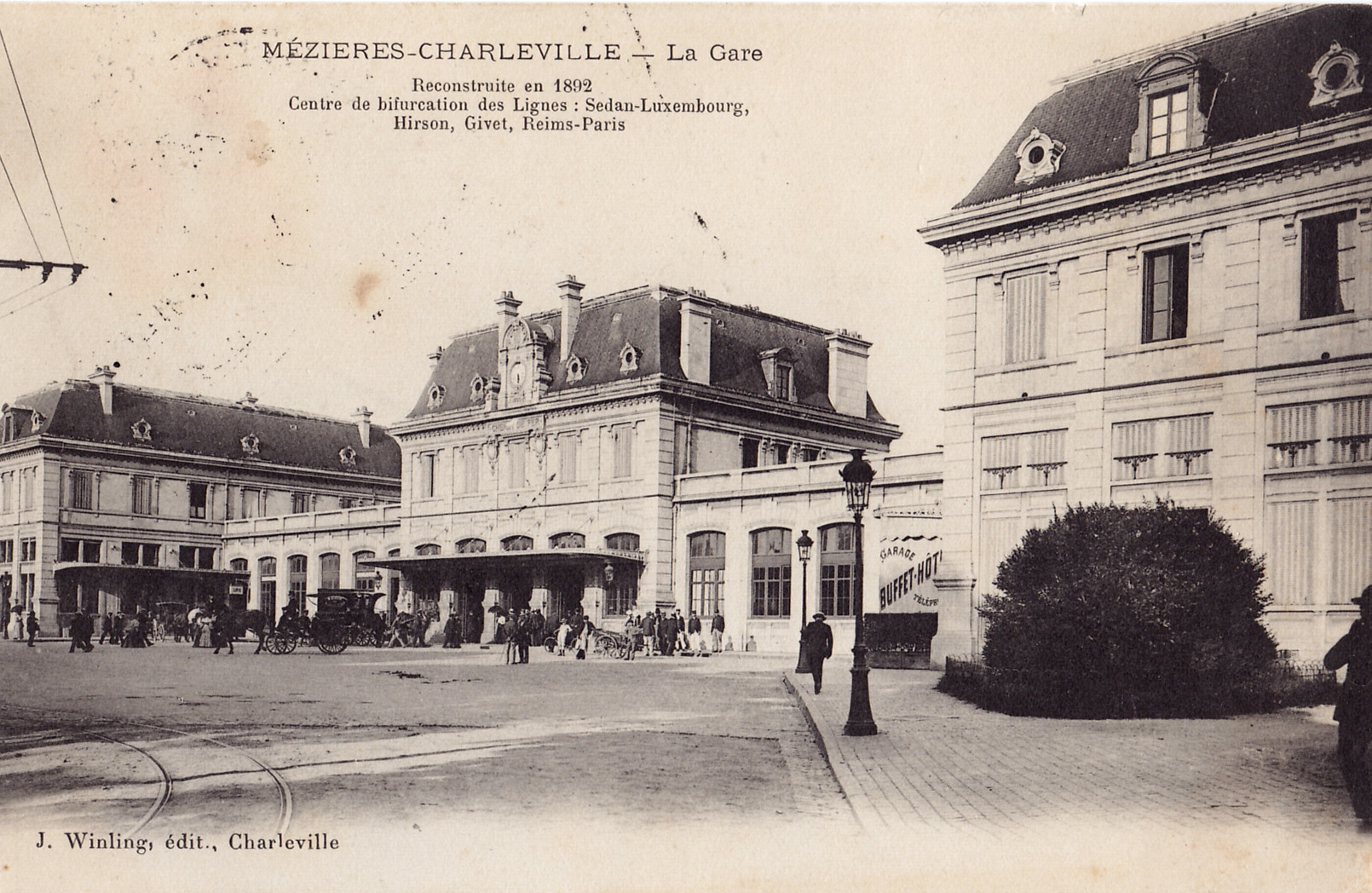 Car te postale ancienne éditée par J. Winling à Charleville: MEZIERES-CHARLEVILLE - La Gare